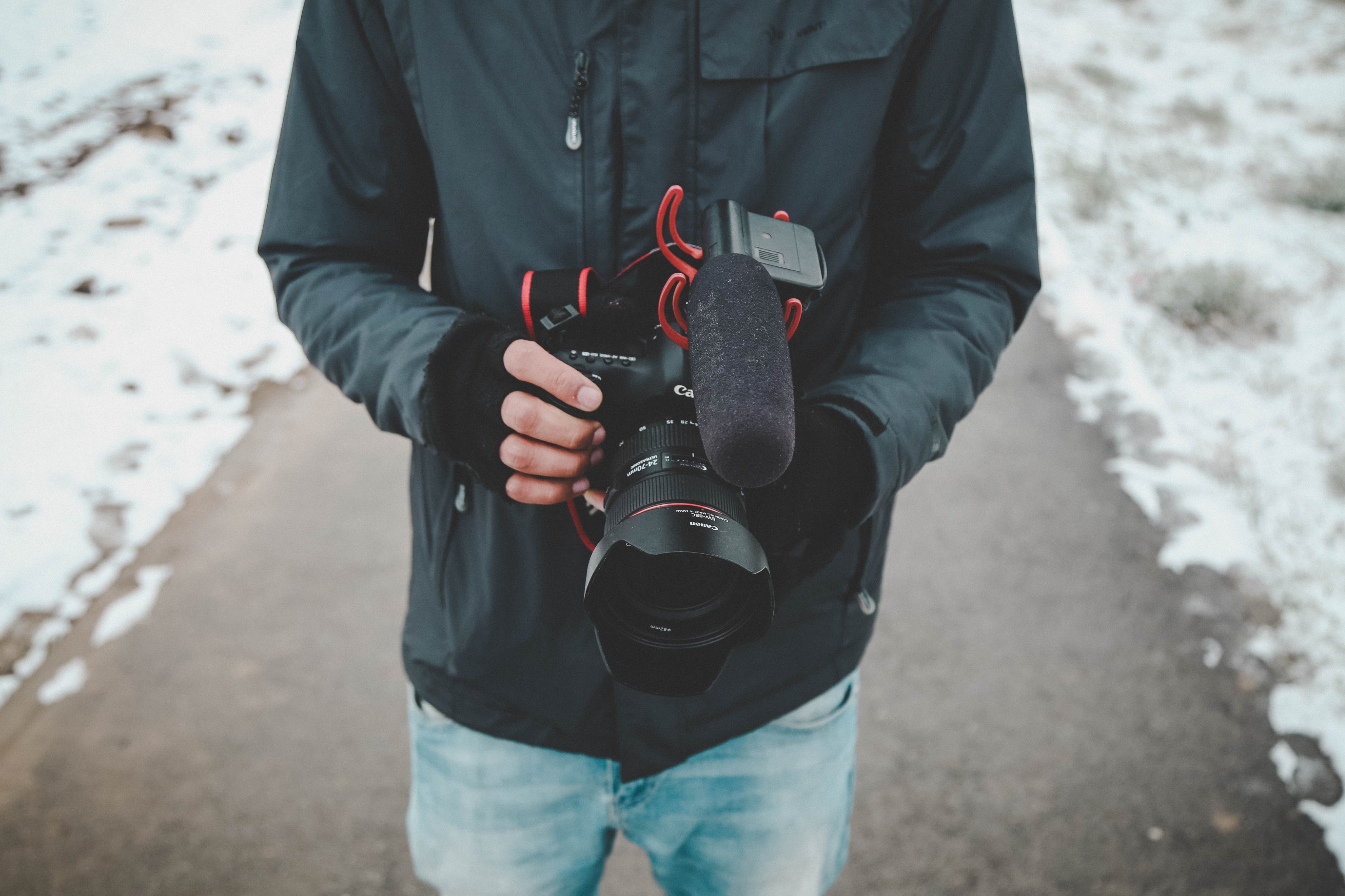 vlogger